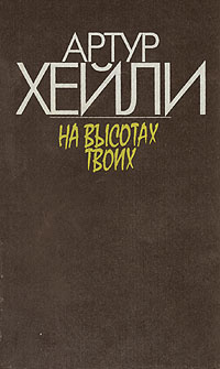 Обложка романа Артур Хейли «На высотах твоих».